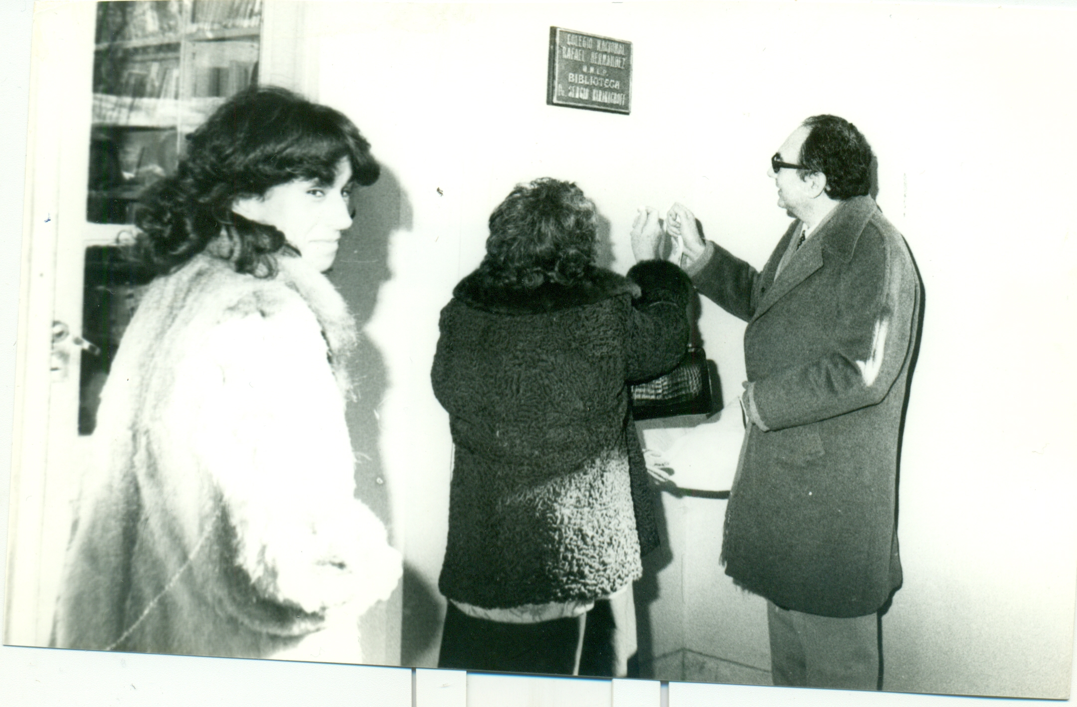 Colocación de la placa de la biblioteca del Colegio Nacional Rafael Hernández.